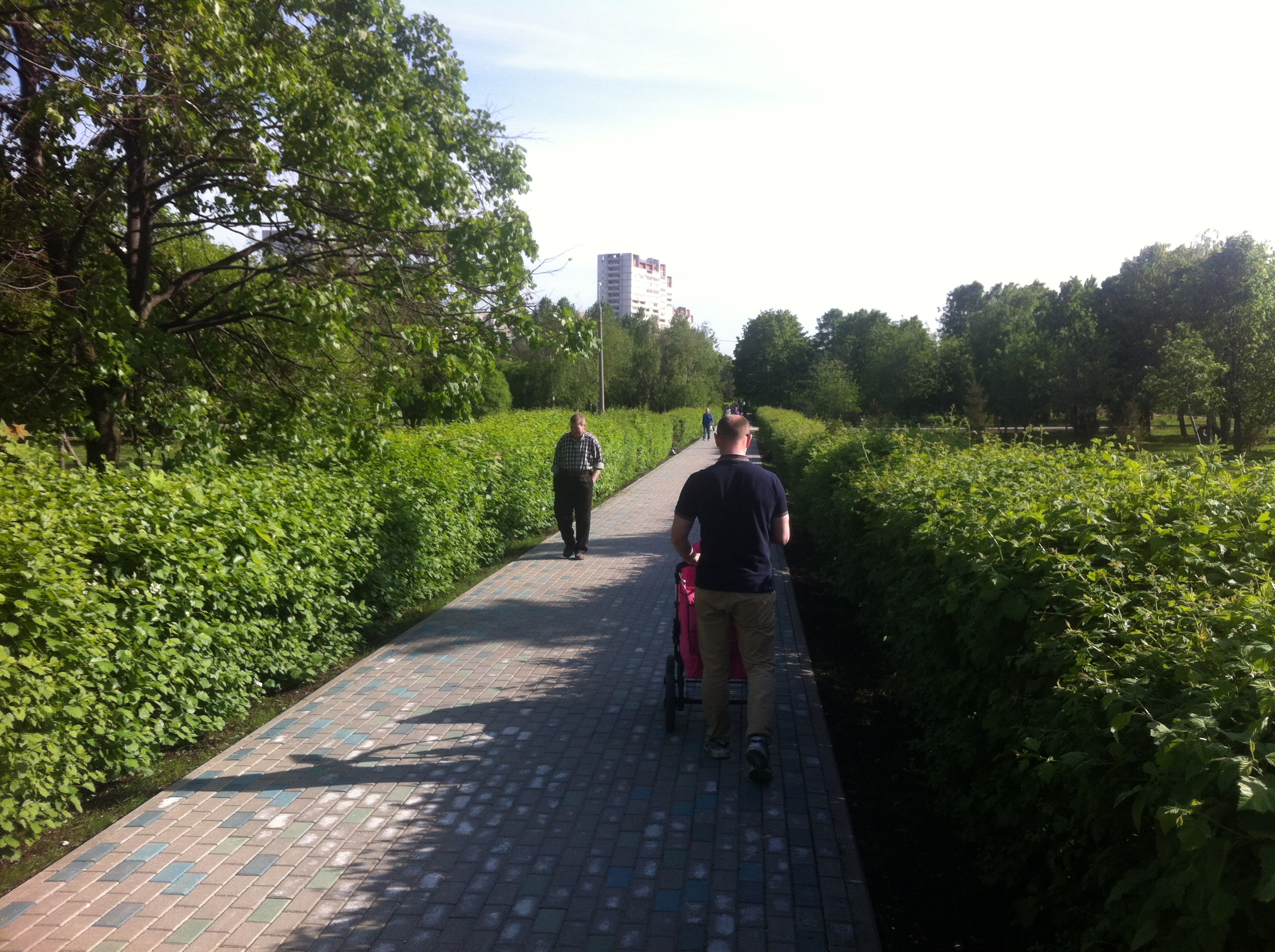 Таллинский парк в районе Печатники в Москве, отремонтированная часть